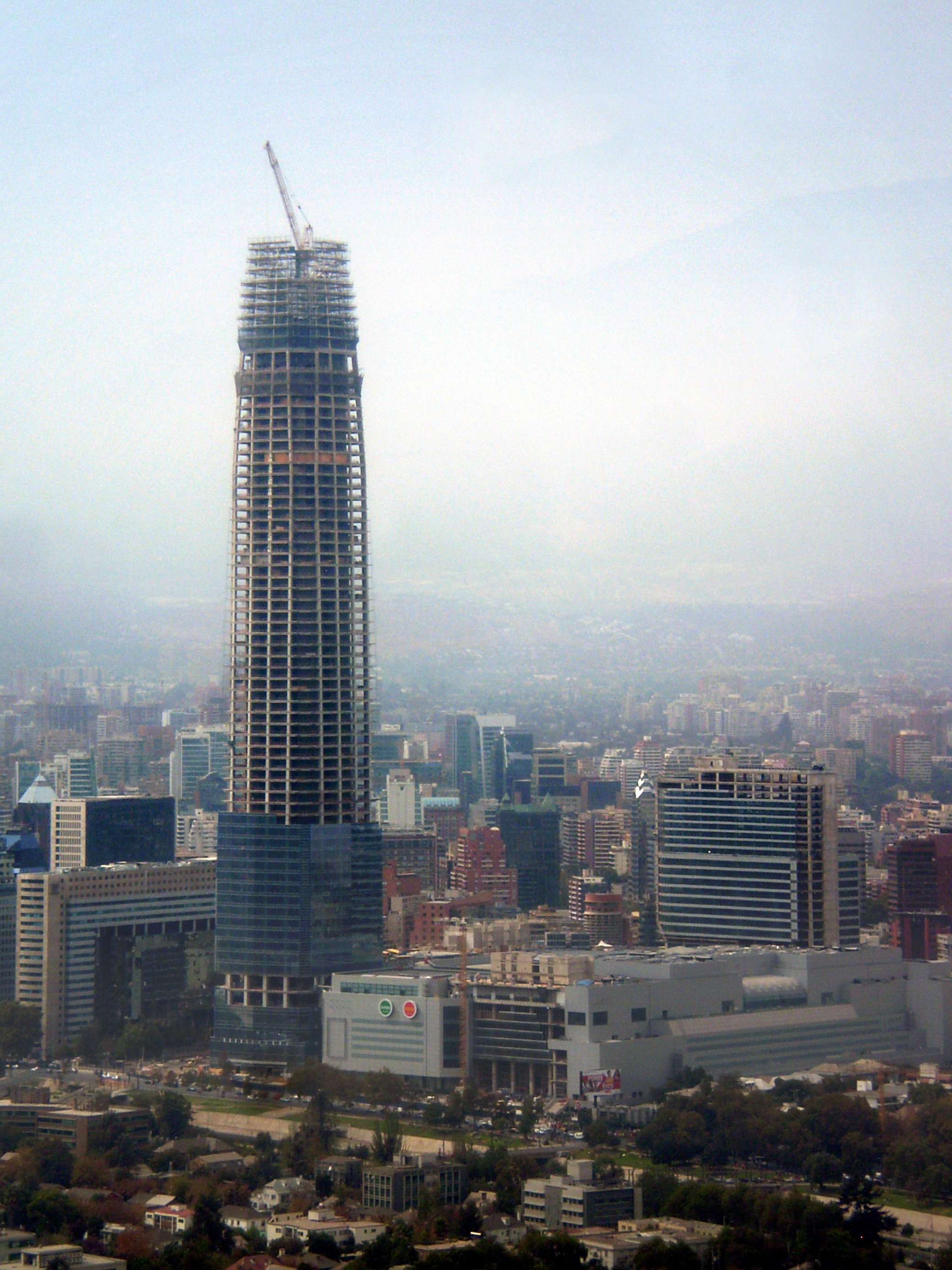 La Gran Torre Santiago junto al complejo Costanera Center aún en construcción. 9 de abril de 2012.